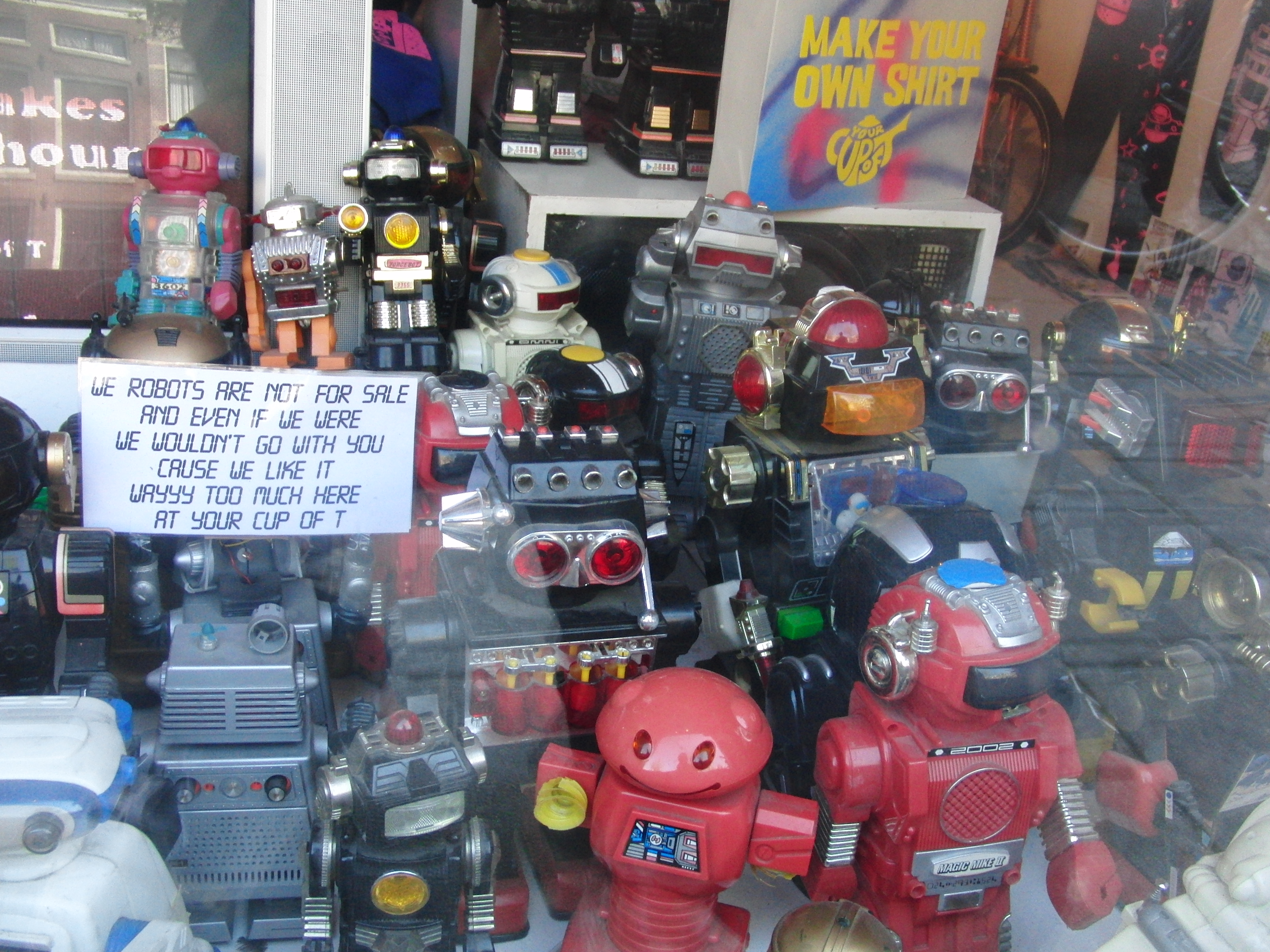 Toy robots collection Amsterdam 2009